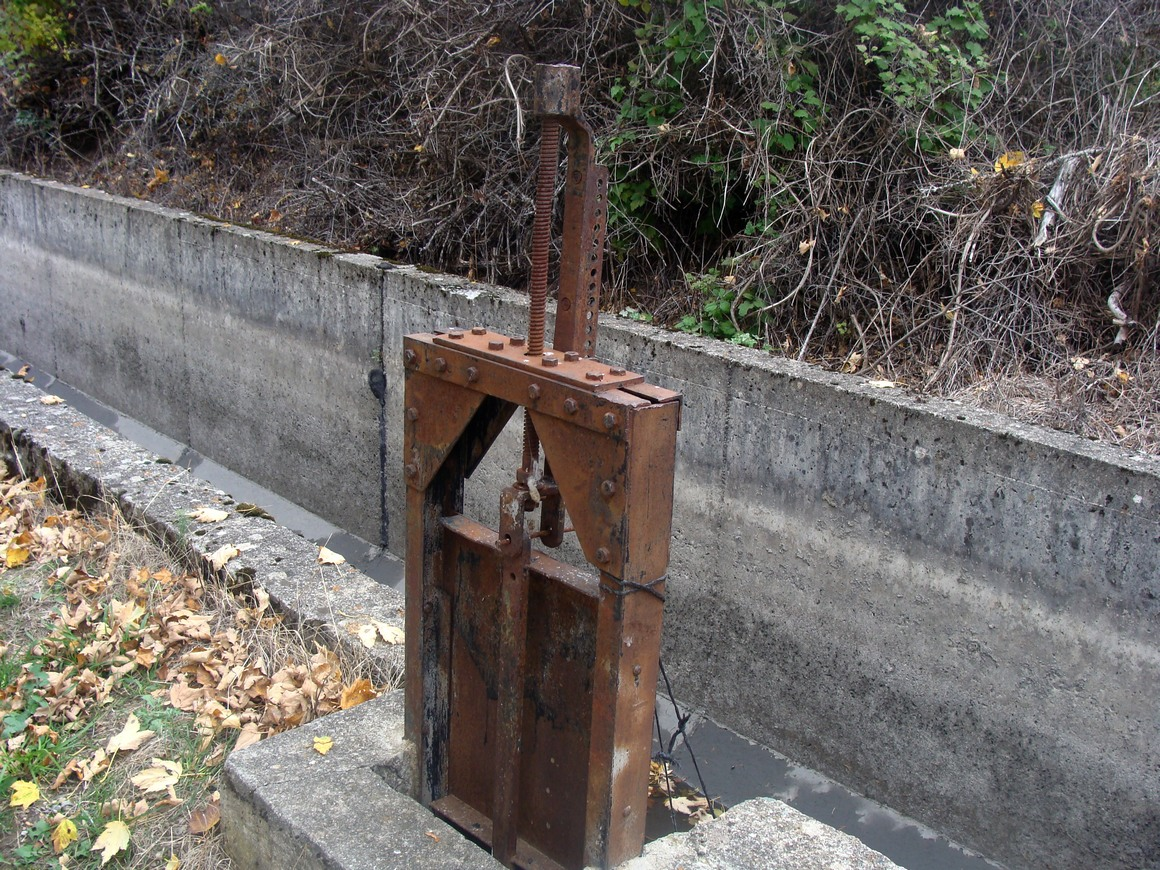 Martelière métallique sur le canal de Gap (Hautes-Alpes, France). Commande par vis-sans-fin. La vanne est ici levée.